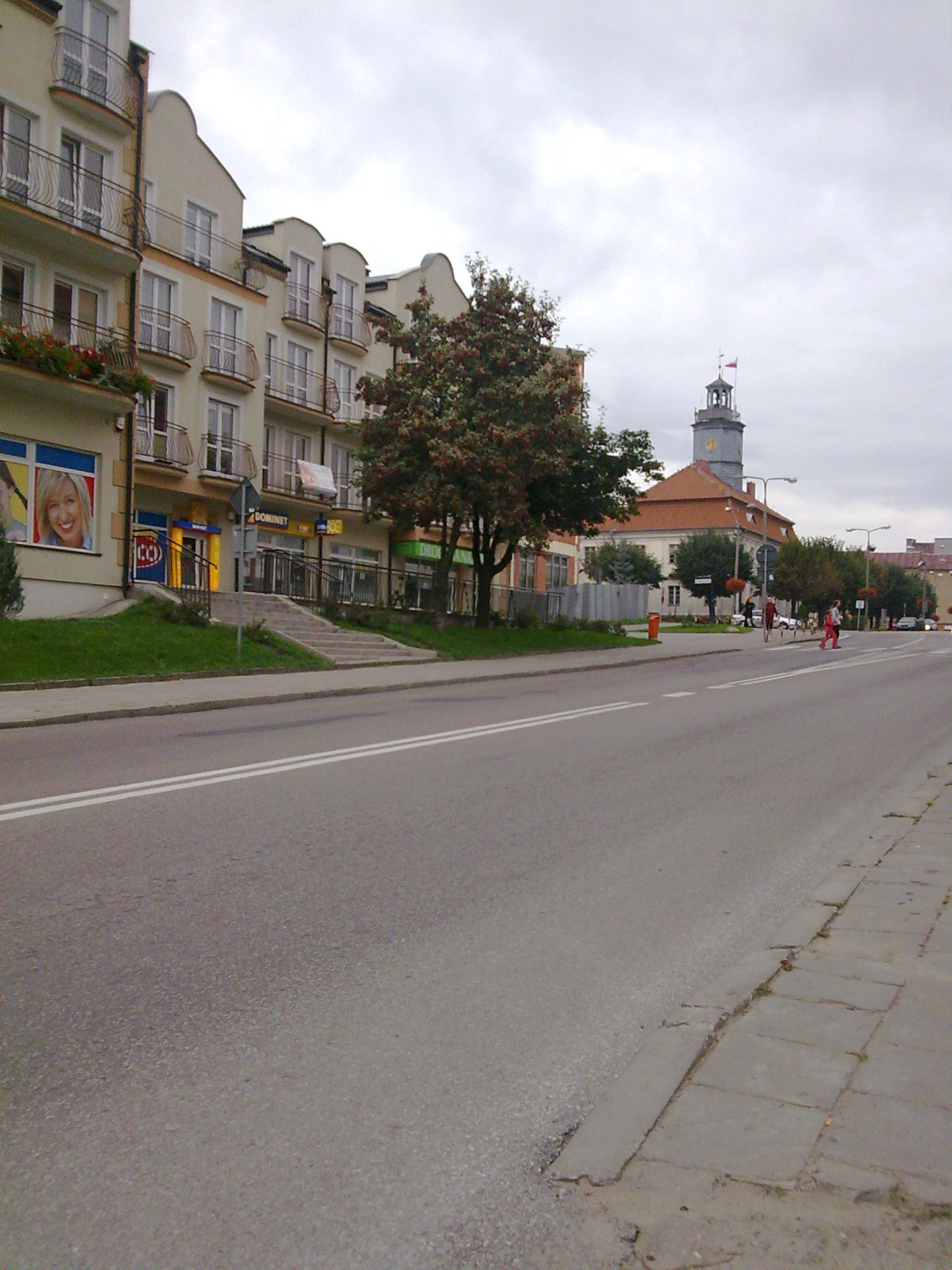 widok na ul.Warszawska ,w oddali wieża Ratusza